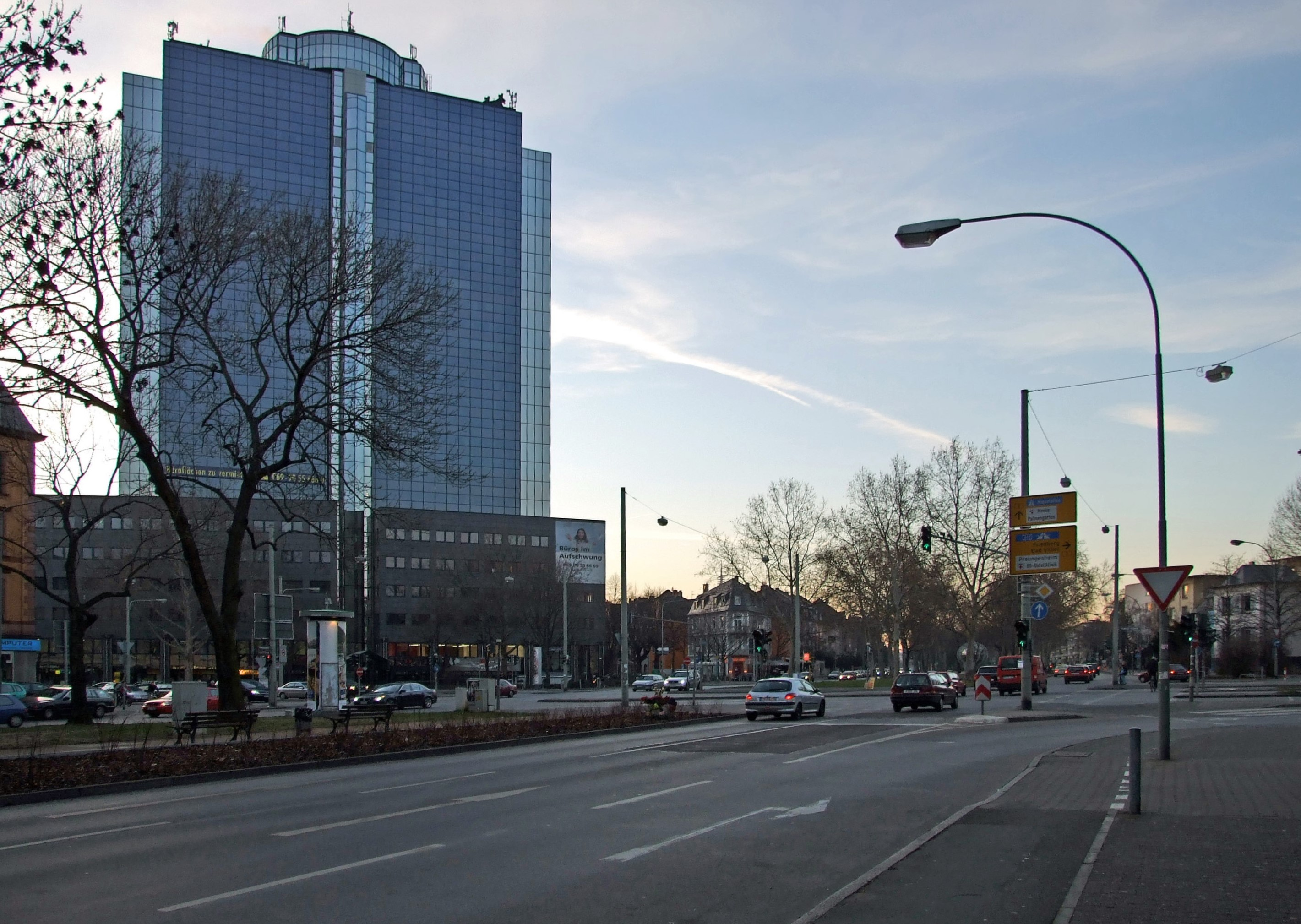 Buero-Center am Nibelungenplatz